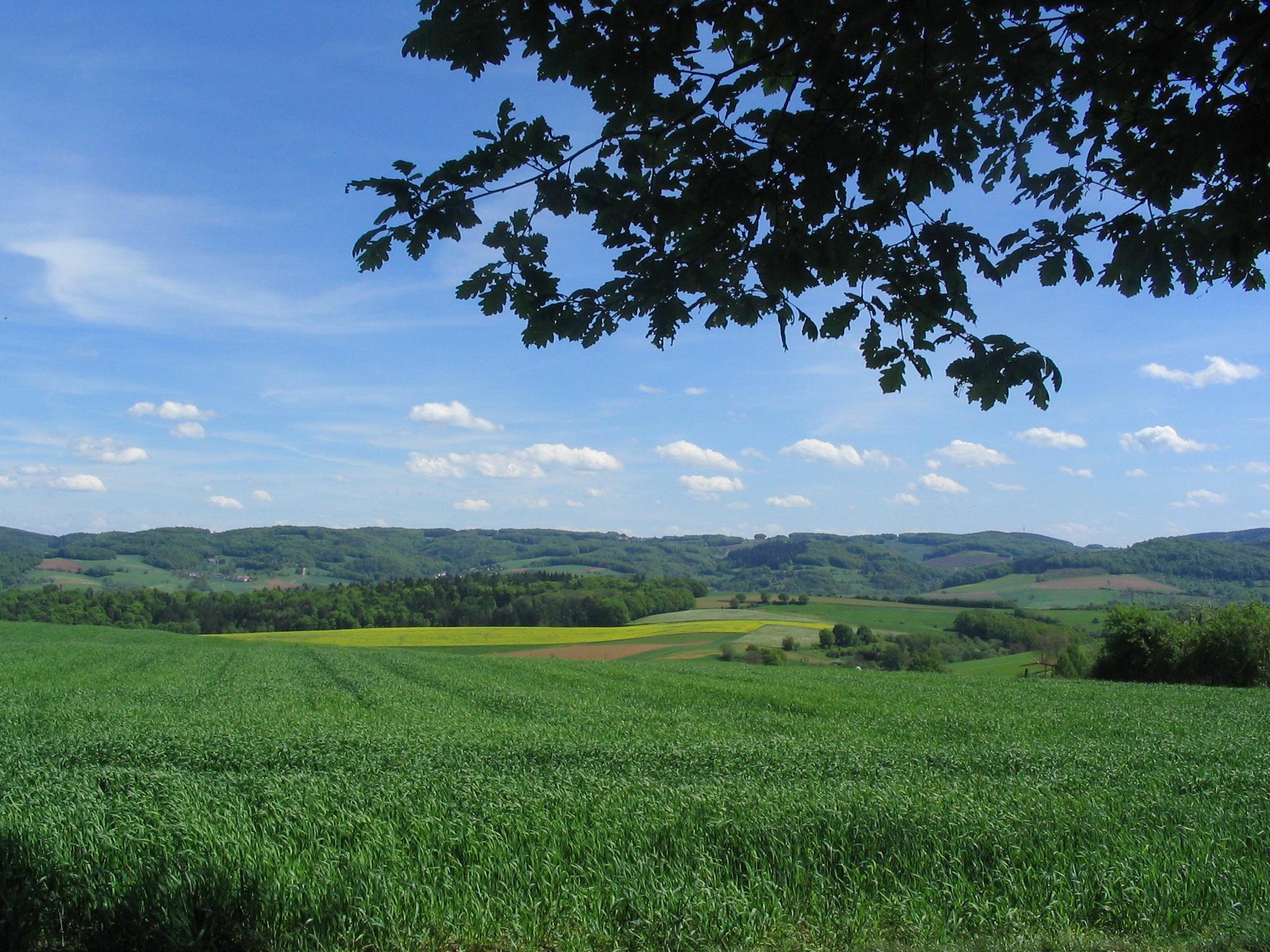 Blick über das Gersprenztal zum Höhenzug des Böllsteiner Odenwalds mit der Höhensiedlung Böllstein (Mitte) von Fränkisch-Crumbach - Schleiersbach aus